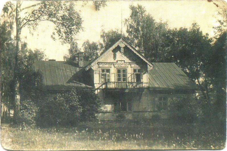 Vyžuonėlių (Blagodat) dvaras